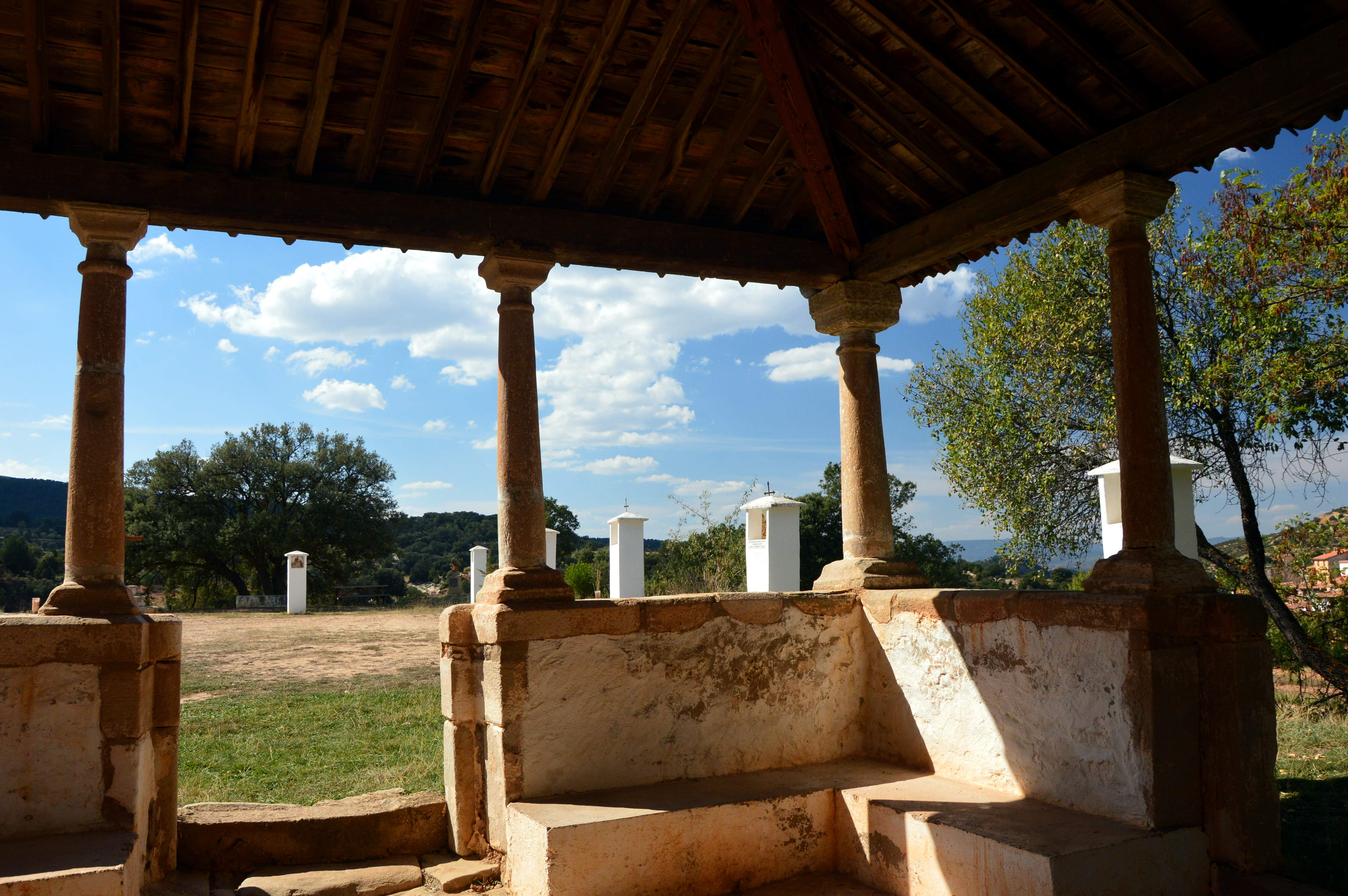 Detalle del atrio cubierto de la Ermita de la Purísima en Puebla de San Miguel (Valencia), 2018.